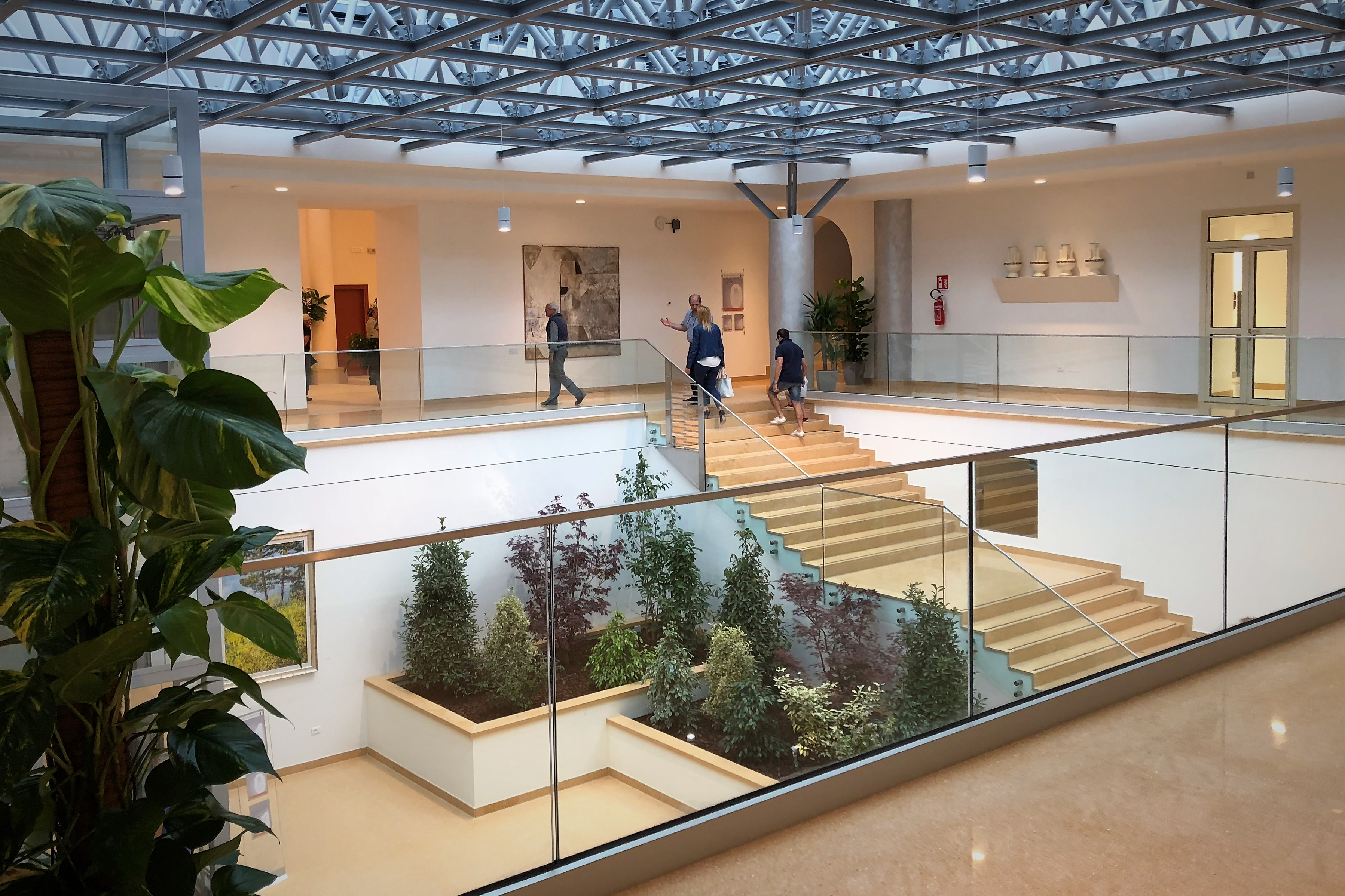 Palazzo dell'Emiciclo. Chiostro